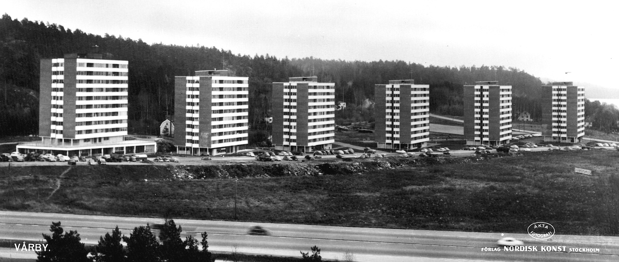 Vårby Haga omkring 1962, de sex punkthusen innan "Ormen Långe" uppfördes